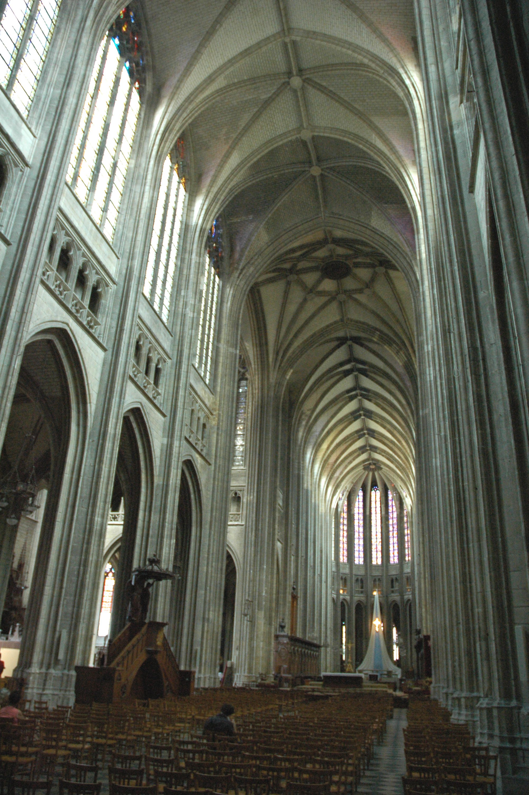 France Loiret Orléans Cathédrale Sainte-Croix Photographie prise par GIRAUD Patrick